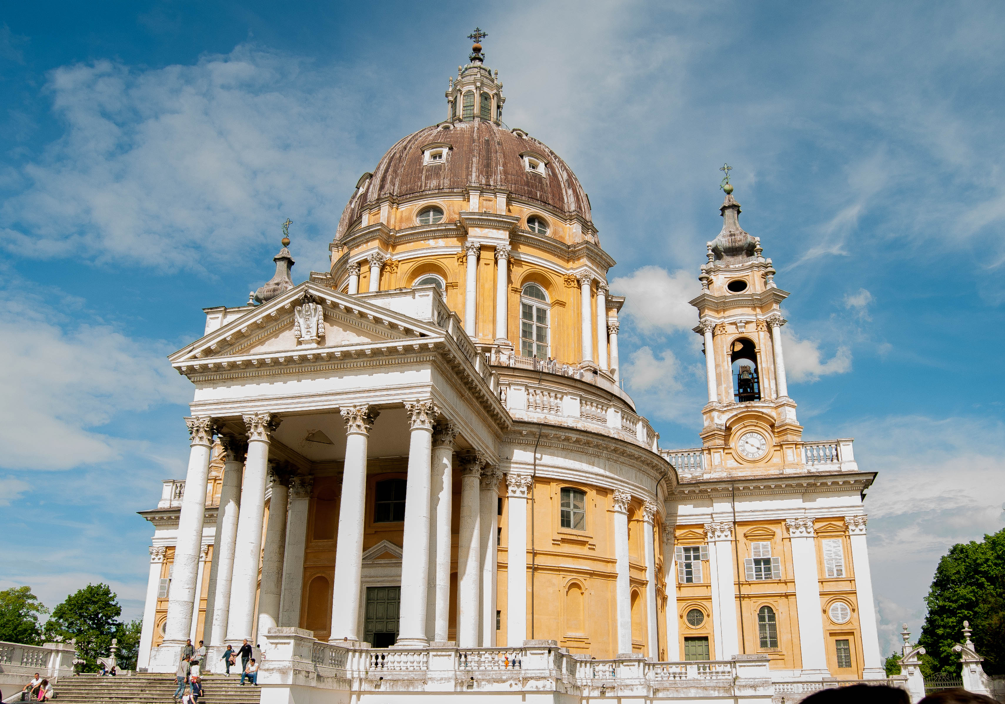 La Basilica di Superga nasce per volere del Duca Vittorio Amedeo II, a seguito di un voto fatto alla Madonna delle Grazie nel 1706, durante l’assedio dei Franco-Spagnoli in Piemonte. Fu Filippo Juvarra ad essere incaricato dal Duca per la costruzione della Basilica, la quale non fu l'unico progetto che l'architetto realizzò nella ex-capitale d'Italia.